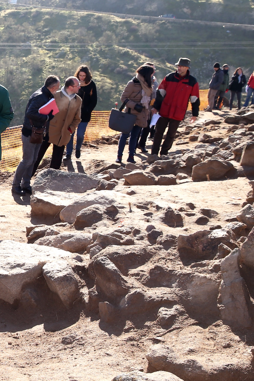 Marta García visita las obras de recuperacion del Cerro del Bú